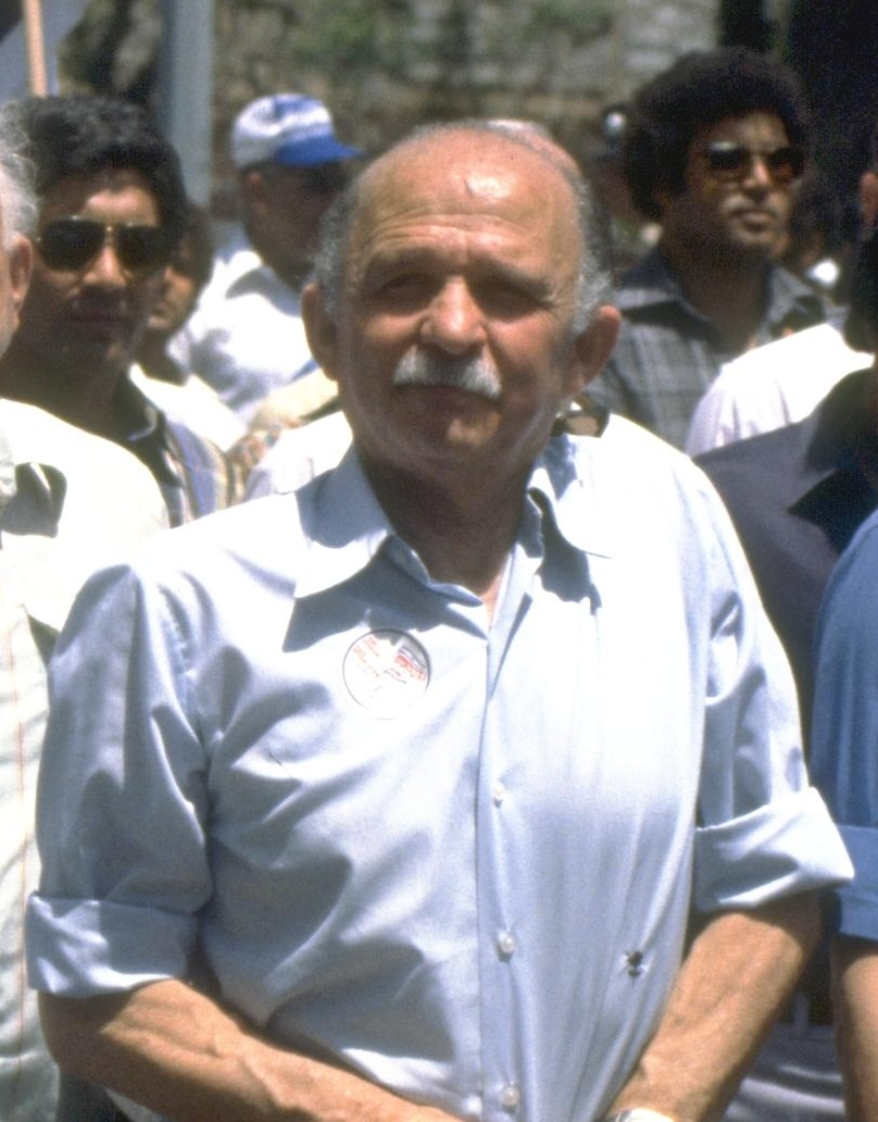 נחתך מ: File:Flickr - Government Press Office (GPO) - May Day in Tel Aviv.jpg. Photo: Yaakov Saar (1951–) Alternative names SA'AR YA'ACOV; Jacob Saar; Saʻar, YaʻaḳovDescriptionIsraeli photographerDate of birth 1951 Authority control : Q28751896 VIAF: 298161188 NLI: 001394176 creator QS:P170,Q28751896 , 05/01/1980